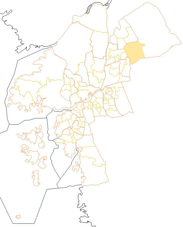 Karta som visar primärområdes belägenhet i Göteborg